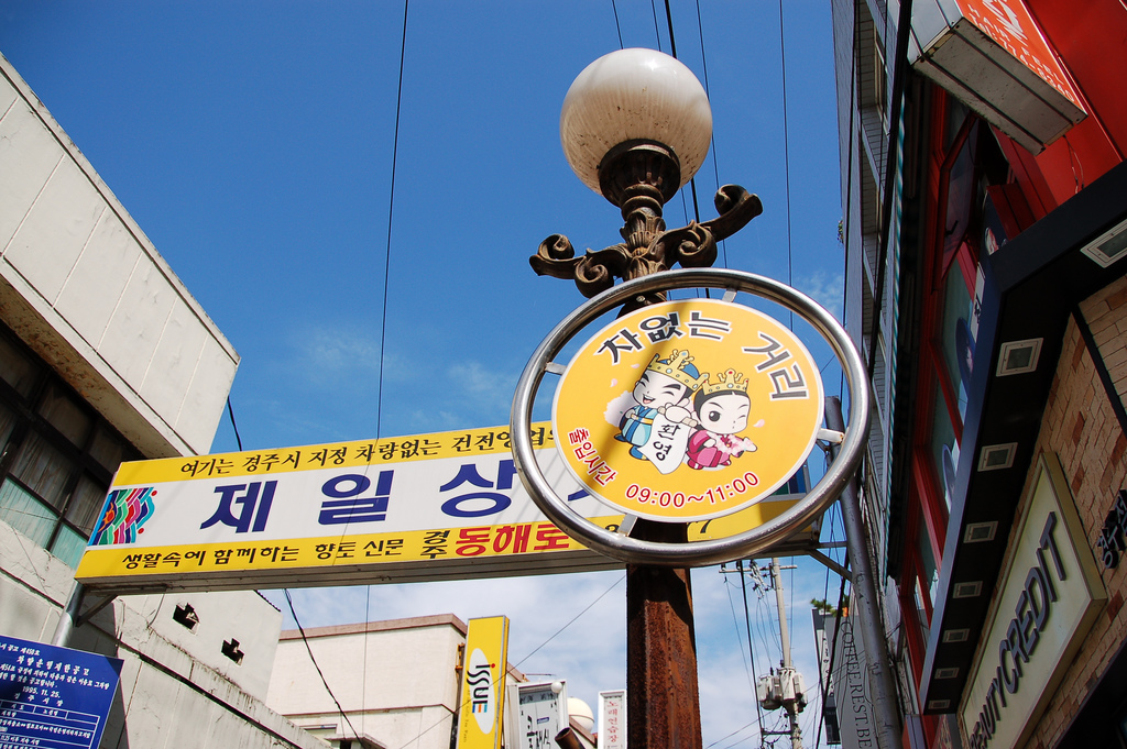 gyeongju street sign